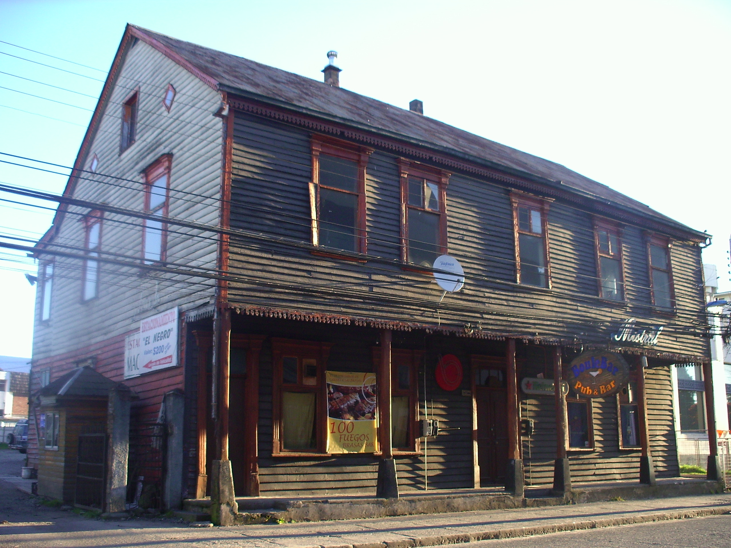 Casa Mohr Pérez This is a photo of a national monument in Chile: 713